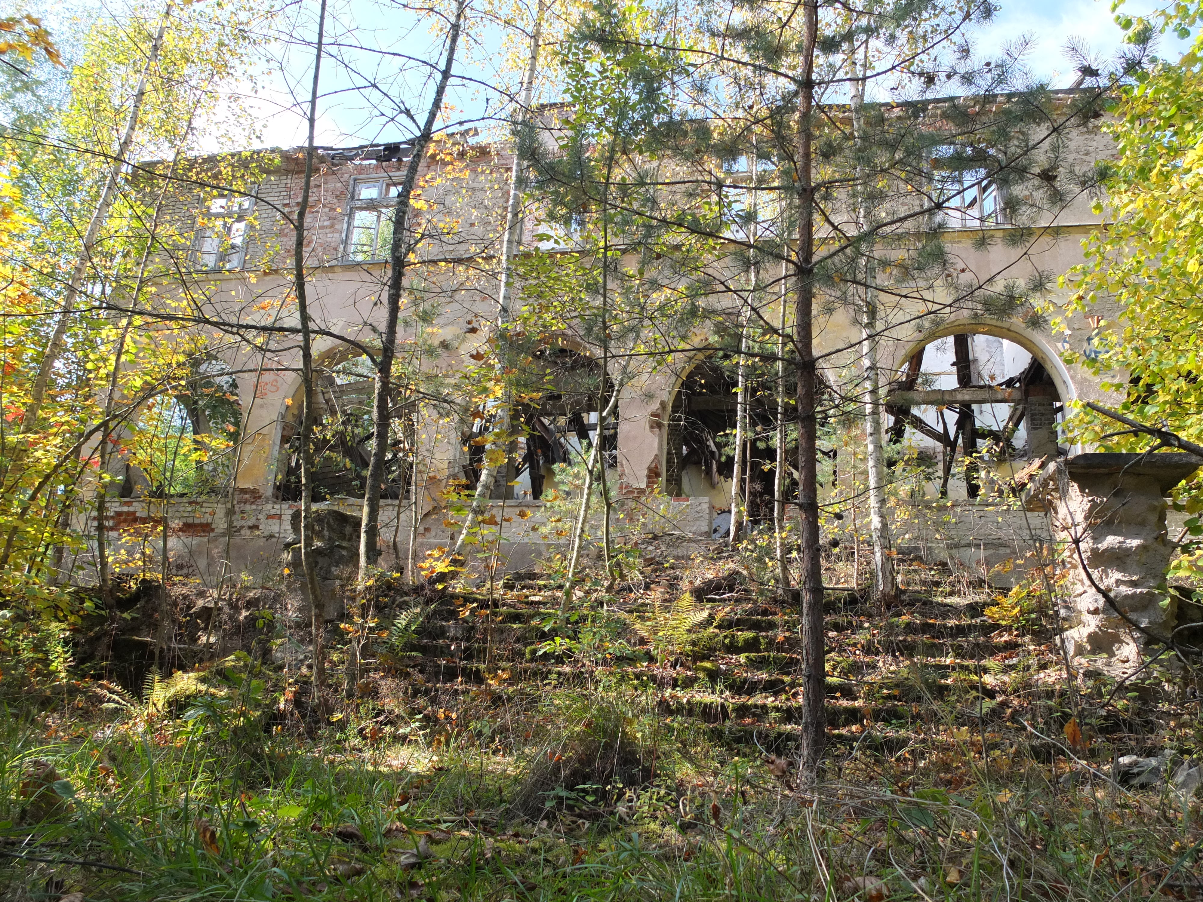 Rudziska Pasymskie - pozostałości po budynku Mazurskiego Uniwersytetu Ludowego